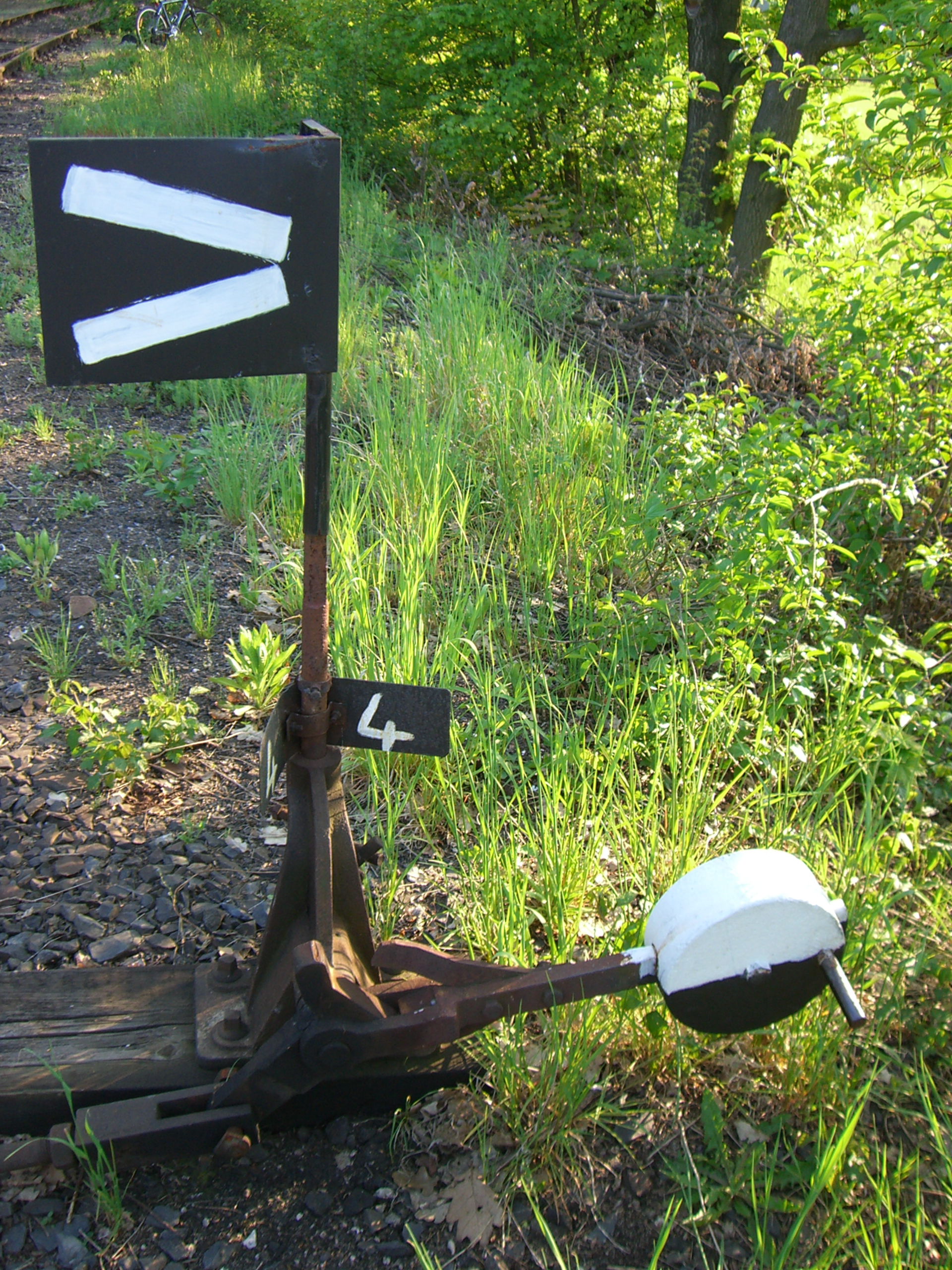 Výhybka na nepoužívané trati v Pardubicích